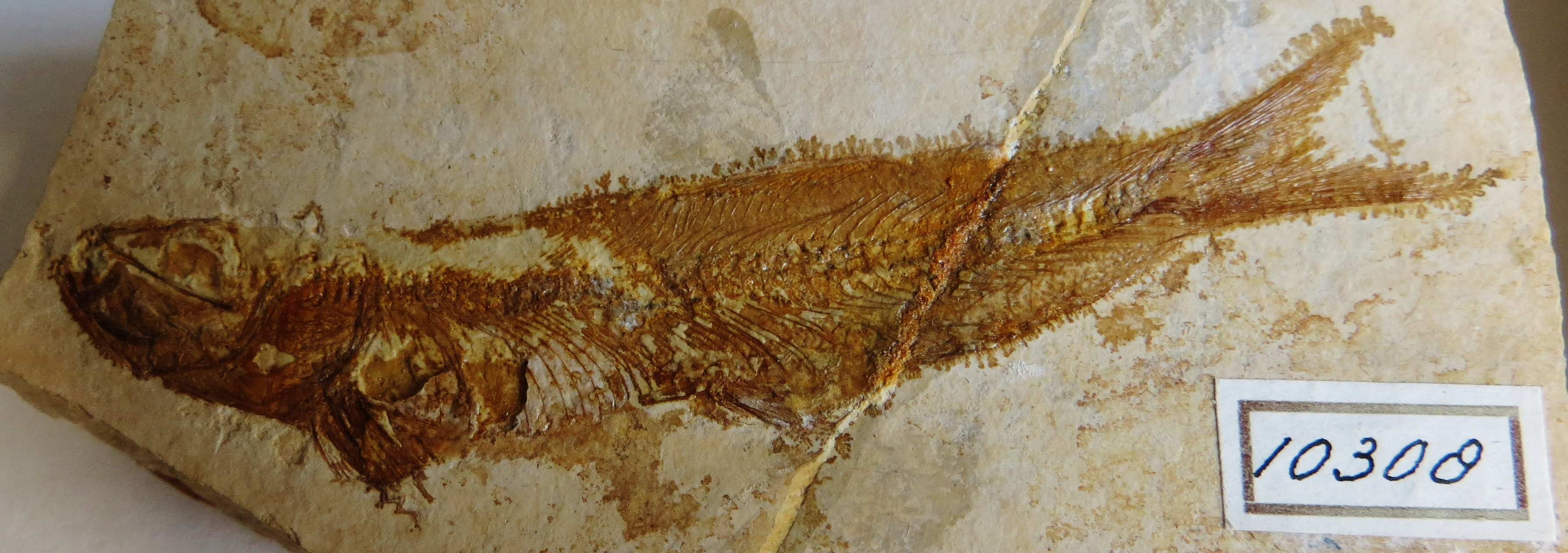 Fossil of Anaethalion, an extinct fish - Took the picture at Teylers Museum, Haarlem